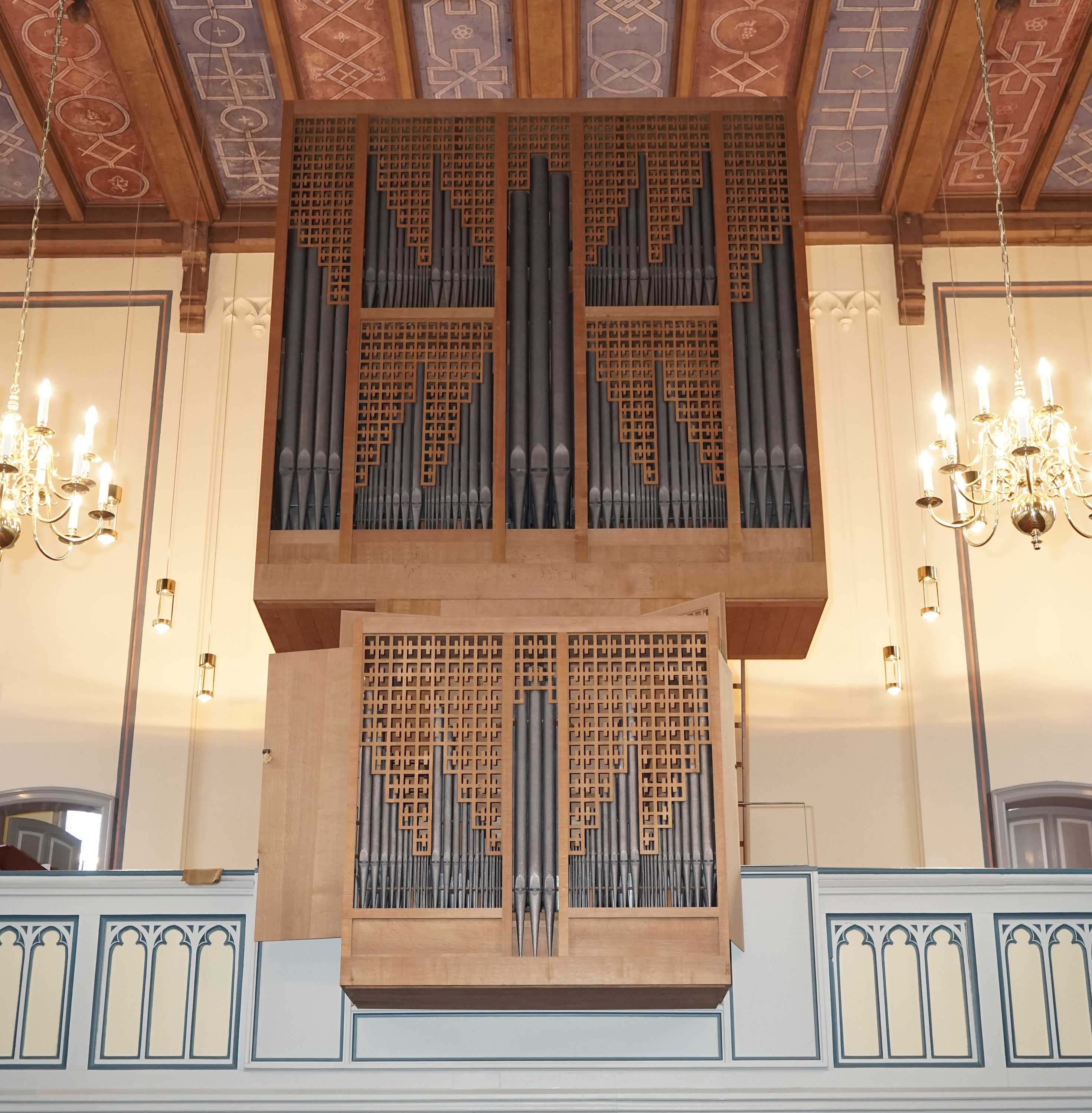 St. Johann in Bremen, Oberneulander Landstraße 37. Orgel von Ahrend & Brunzema (1966), 1996 wurden von Ahrend sieben Stimmen auf einem dritten Manual ergänzt.Die Gesamtanlage ist ein geschütztes Kulturdenkmal in der Freien Hansestadt Bremen, mit der Nr. 1342 beim Landesamt für Denkmalpflege registriert.